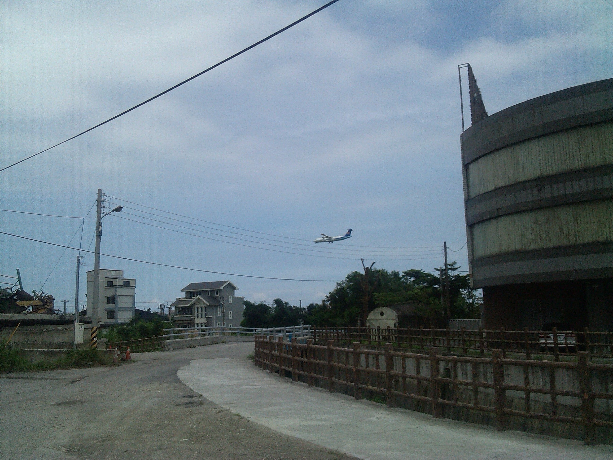 花蓮機場的少數航班之一